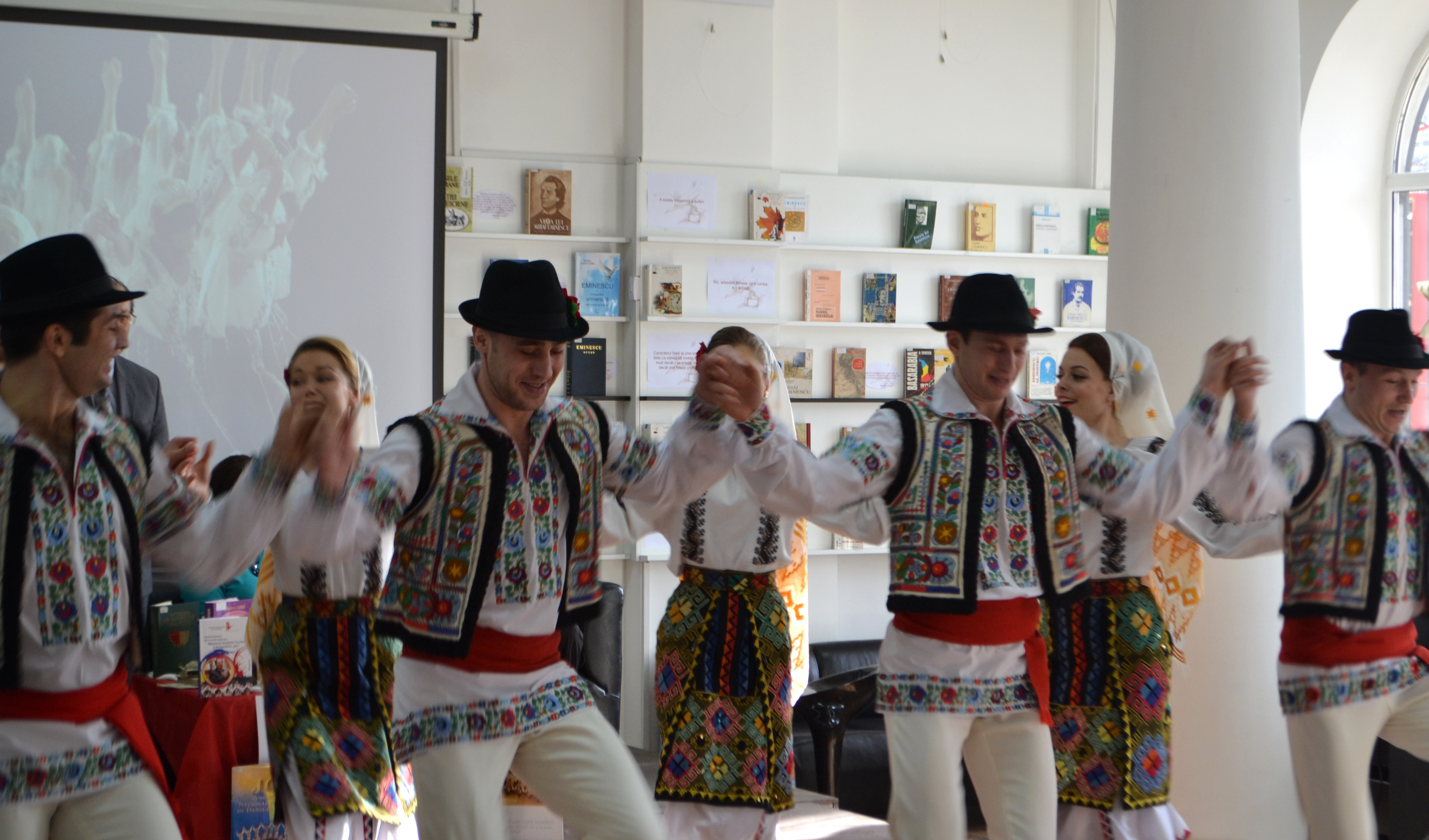 Lansare de carte: Două fenomene ale culturii naționale: Maestrul Vladimir Curbet și Ansamblul Joc / Bibliografie Biblioteca Centrală, 05.02.2016